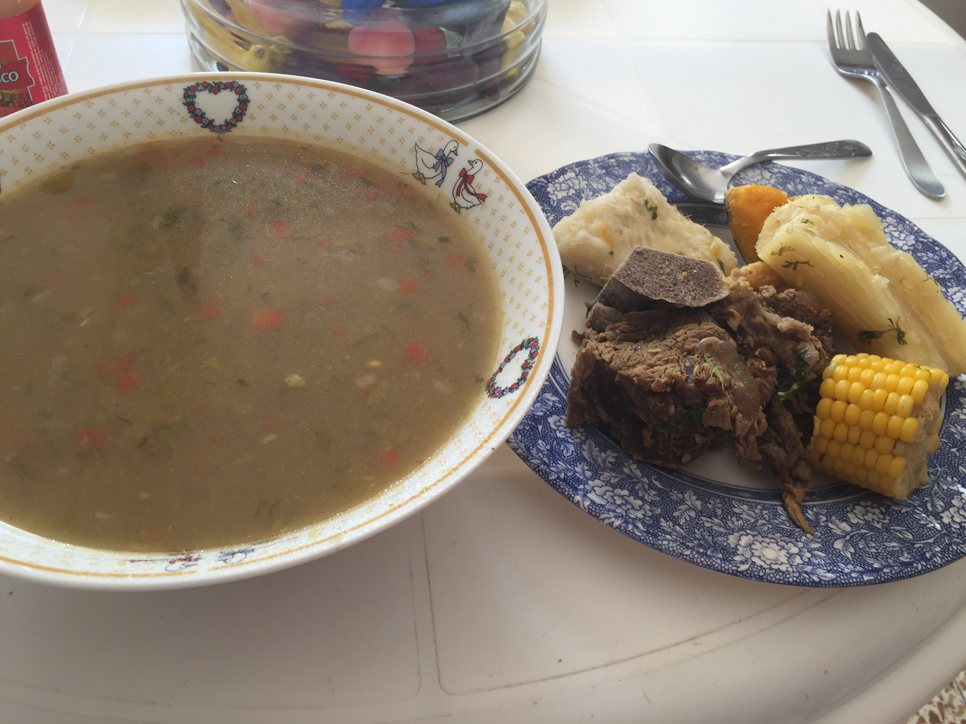 Sancocho de hueso. Barranquilla, Colombia.